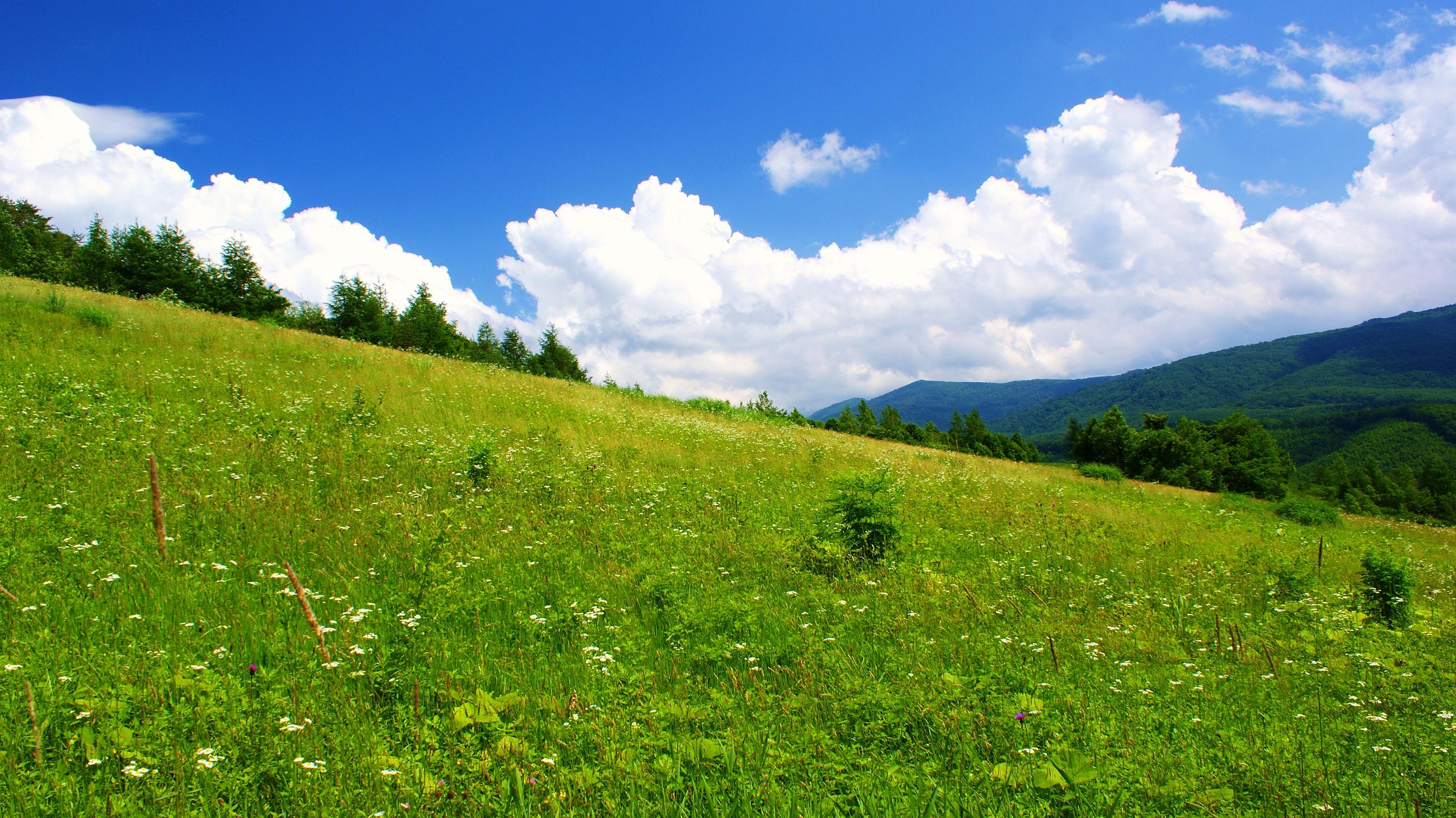 兜明神の花畑